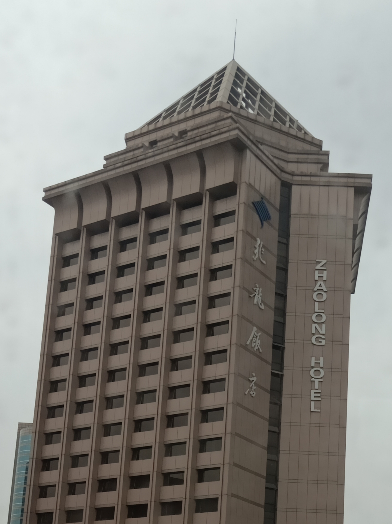 粵語: 北京兆龍飯店